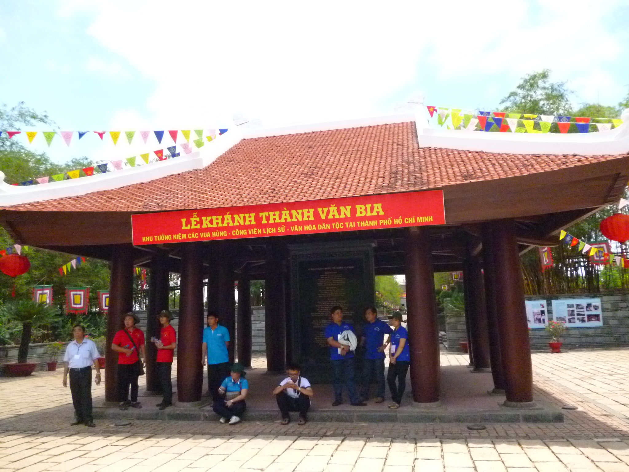 Hình chụp Văn bia tại Khu tưởng niệm Vua Hùng quận 9, chụp bằng máy ảnh cá nhân